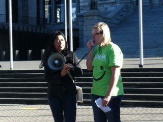 Bridie Hood, VUWSA